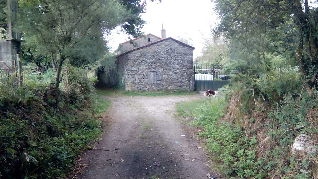 Vista de Zapatería, Curtis.